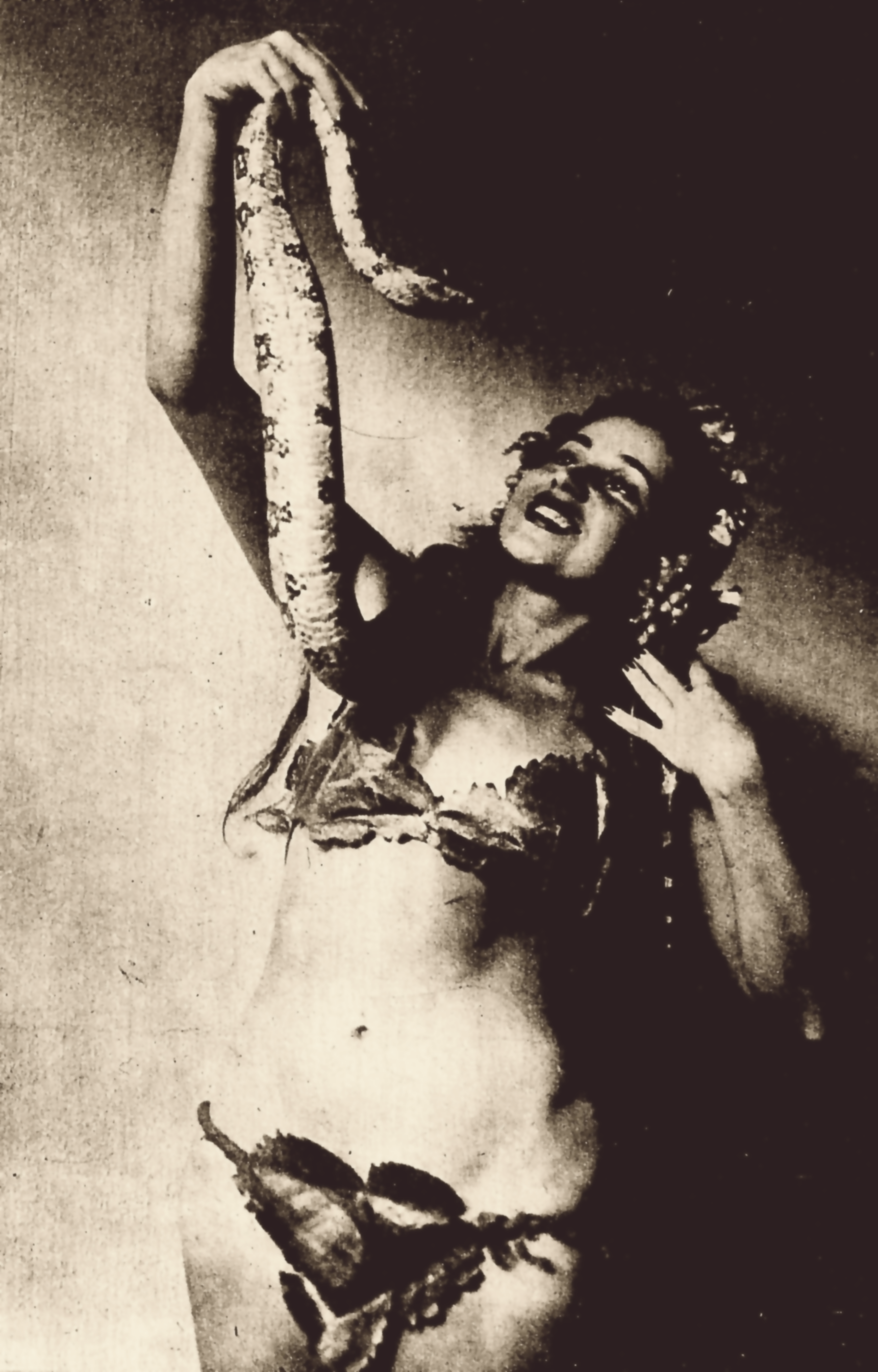 A vedete brasileira Luz del Fuego em 1944, fotografada com uma cobra na revista Carioca.